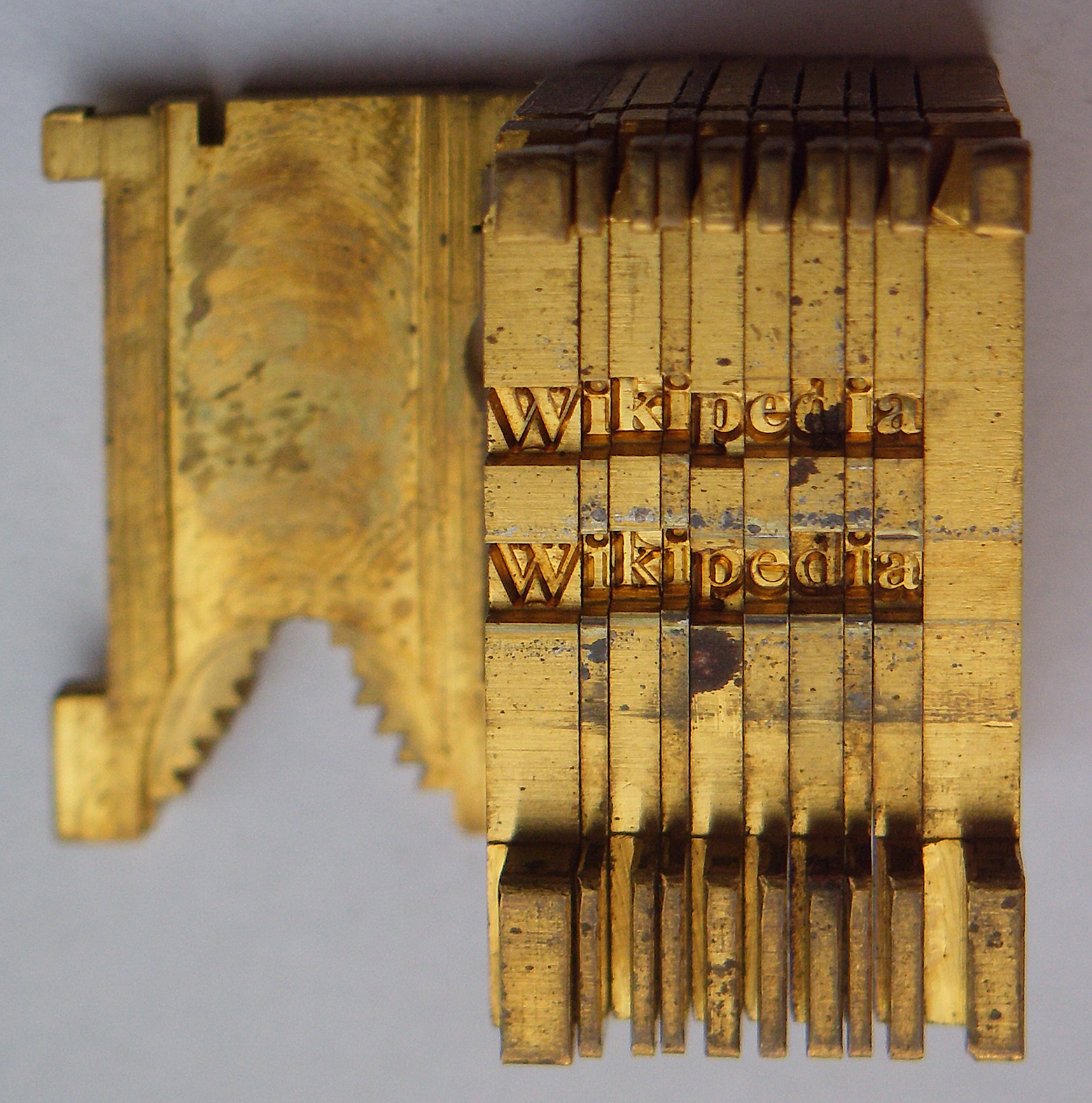 Linotype-Matrix, Guss-Seite